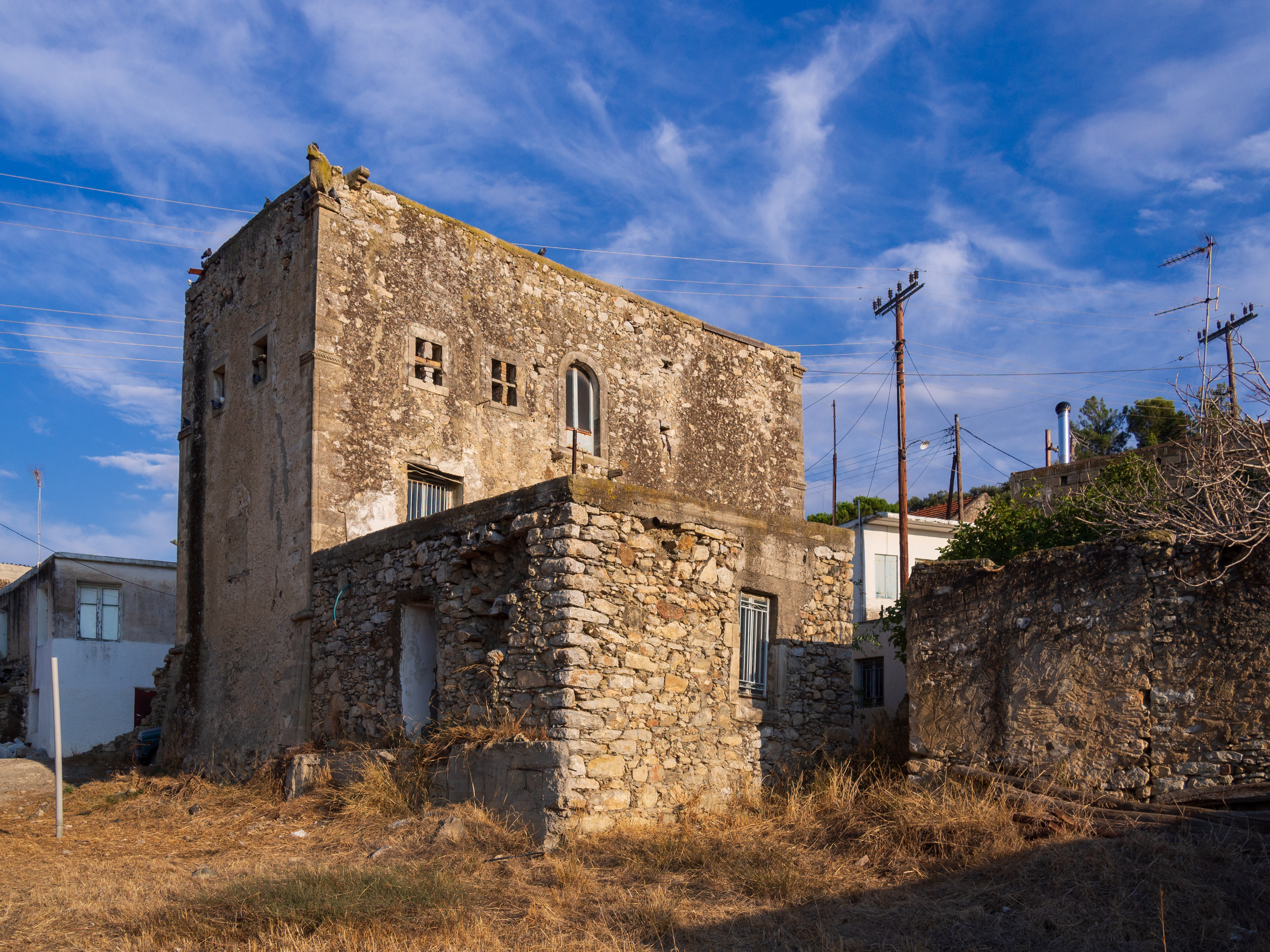 Πύργος Κουρμούλη, Κουσές«Πύργος Κουρμούλη, Κουσές»